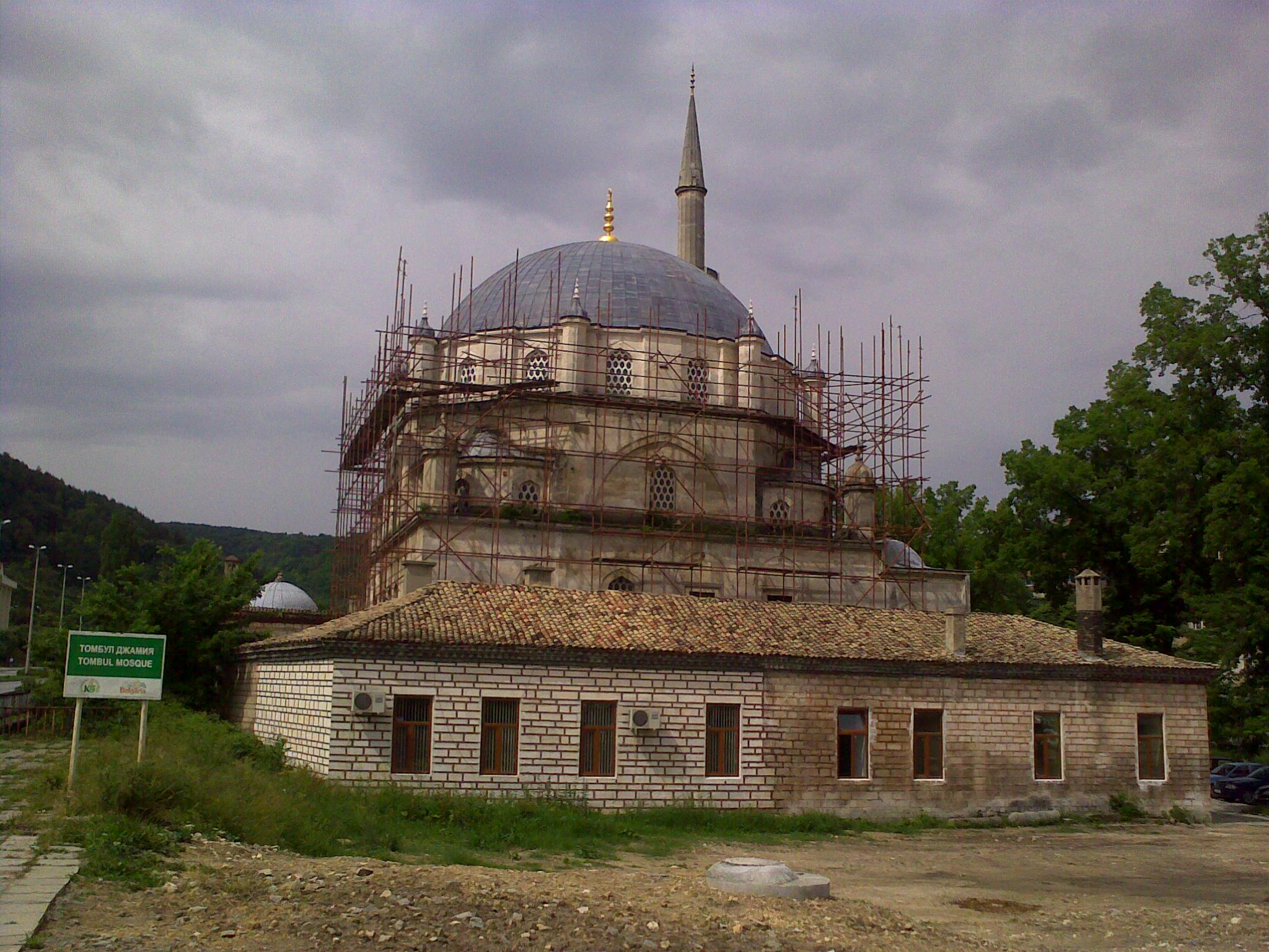 Томбул джамия Шумен